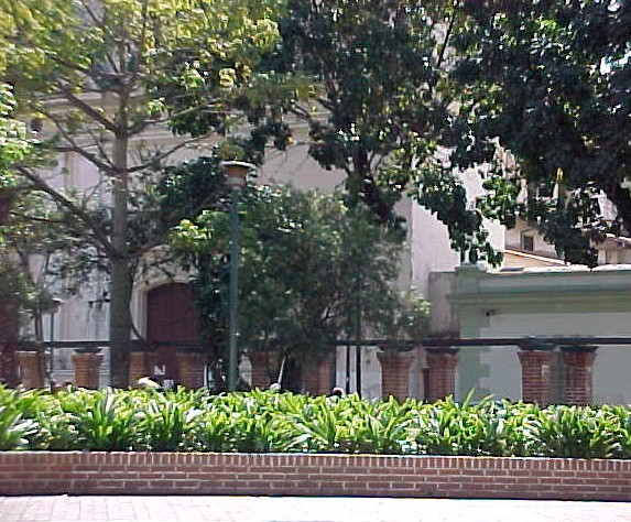 Plaza Capuchinos en el municipio Libertador, Distrito Capital - Venezuela (2000)